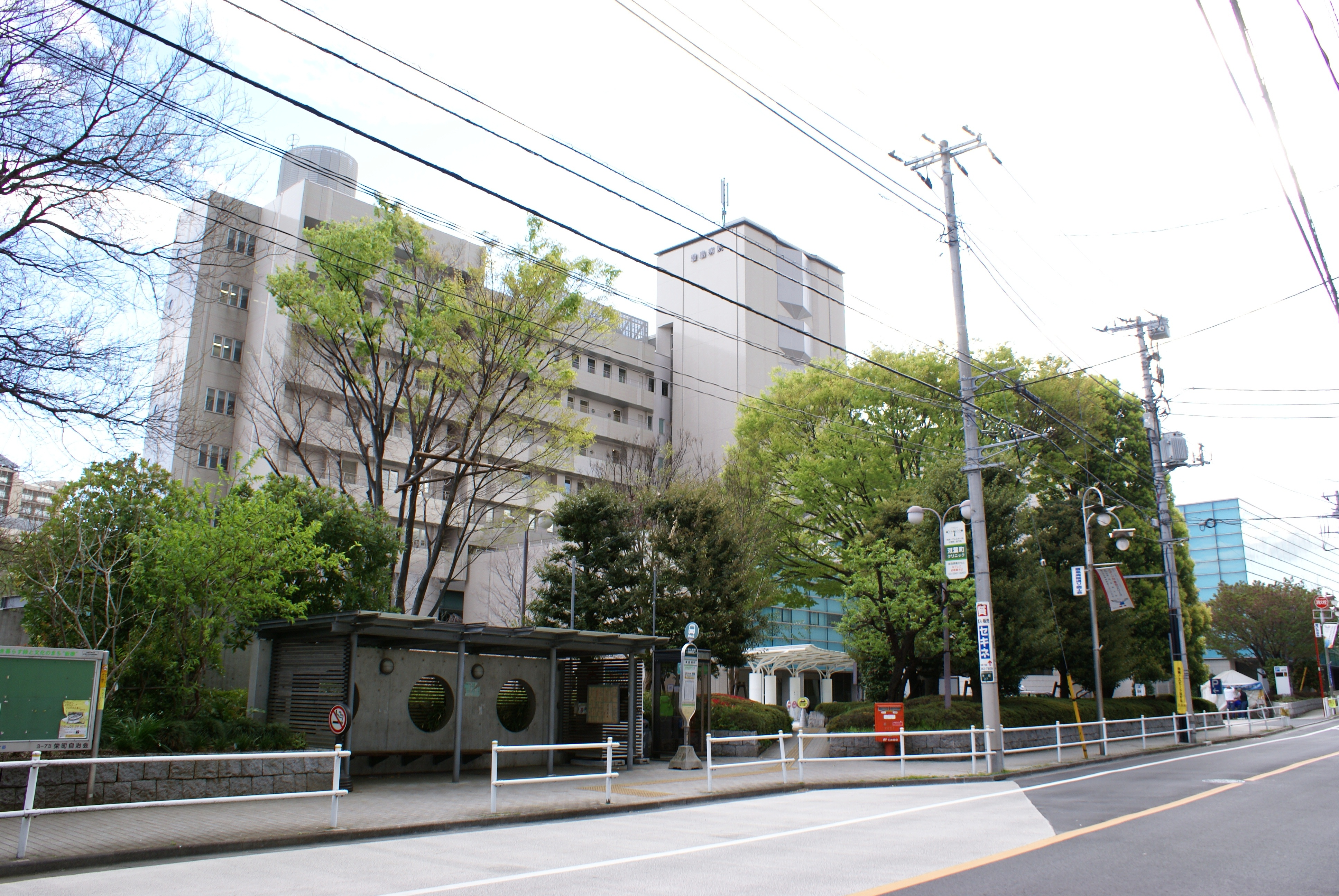 都立豊島病院